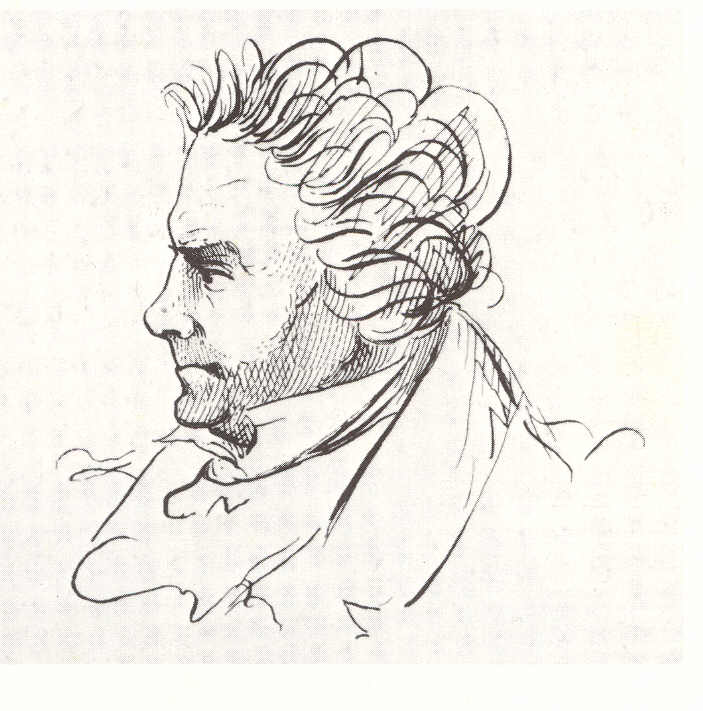 Beethoven karikatuur van J.P Lyser (Gemeentemuseum Den Haag)